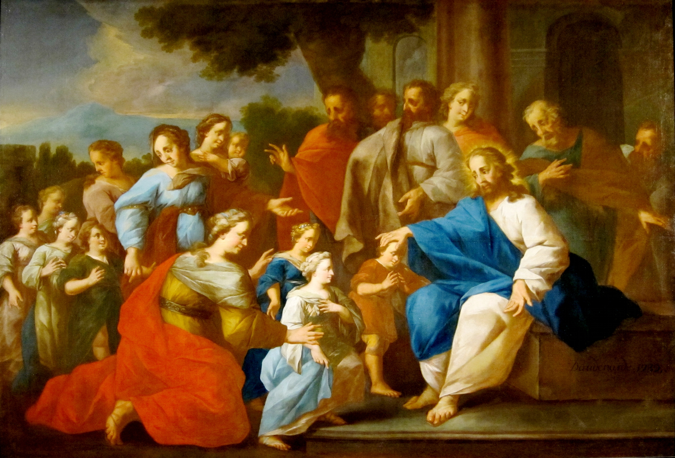 «Laissez venir à moi les petits enfants» (1732) du peintre lillois Lamoral de Daudenarde dans l'église Saint-Sauveur de Lille.